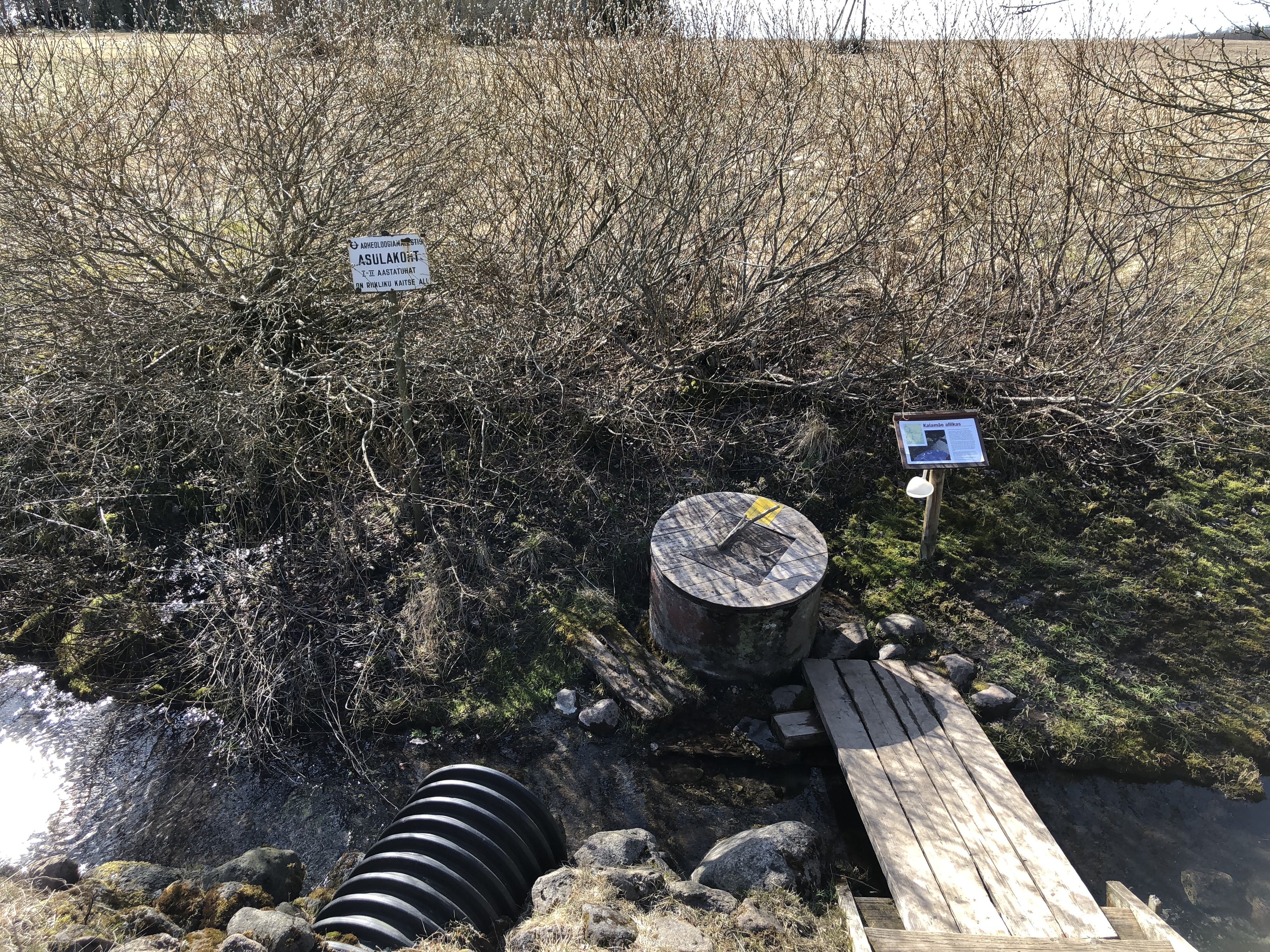 Allikas Paeknas